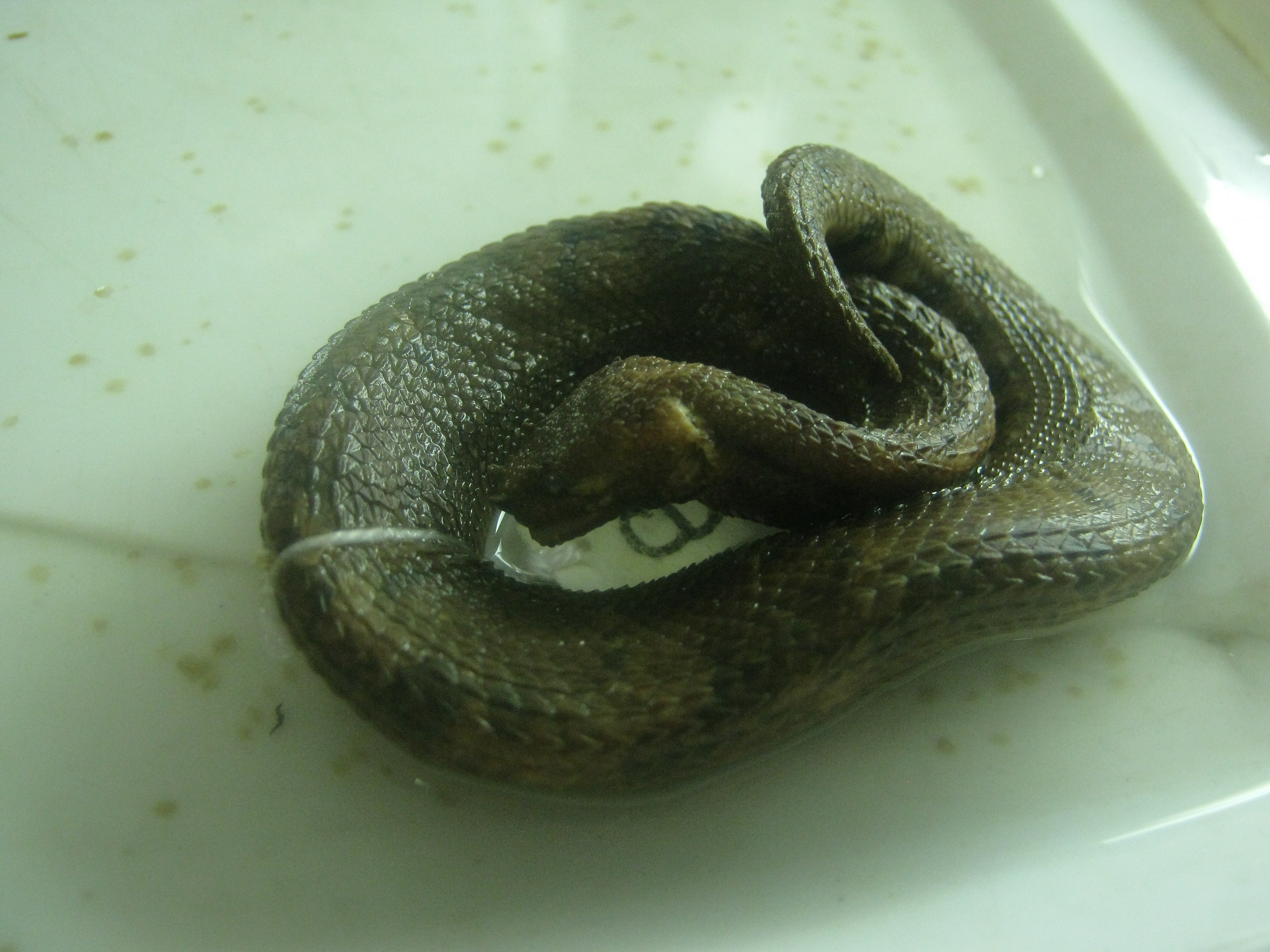 Ejemplar de Trachyboa boulengeri